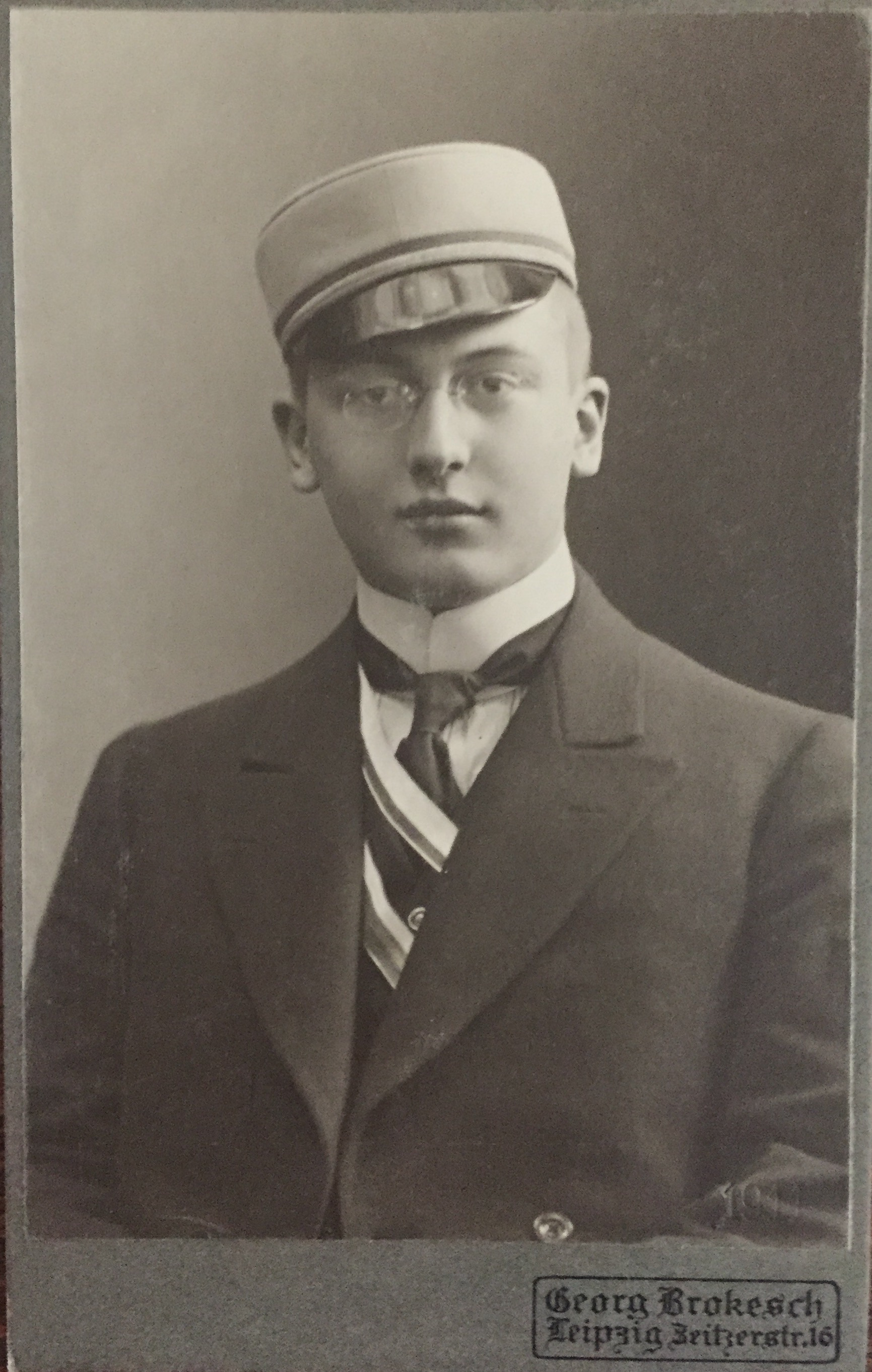 Porträtfotografie von Erich Bauer (1890-1970)